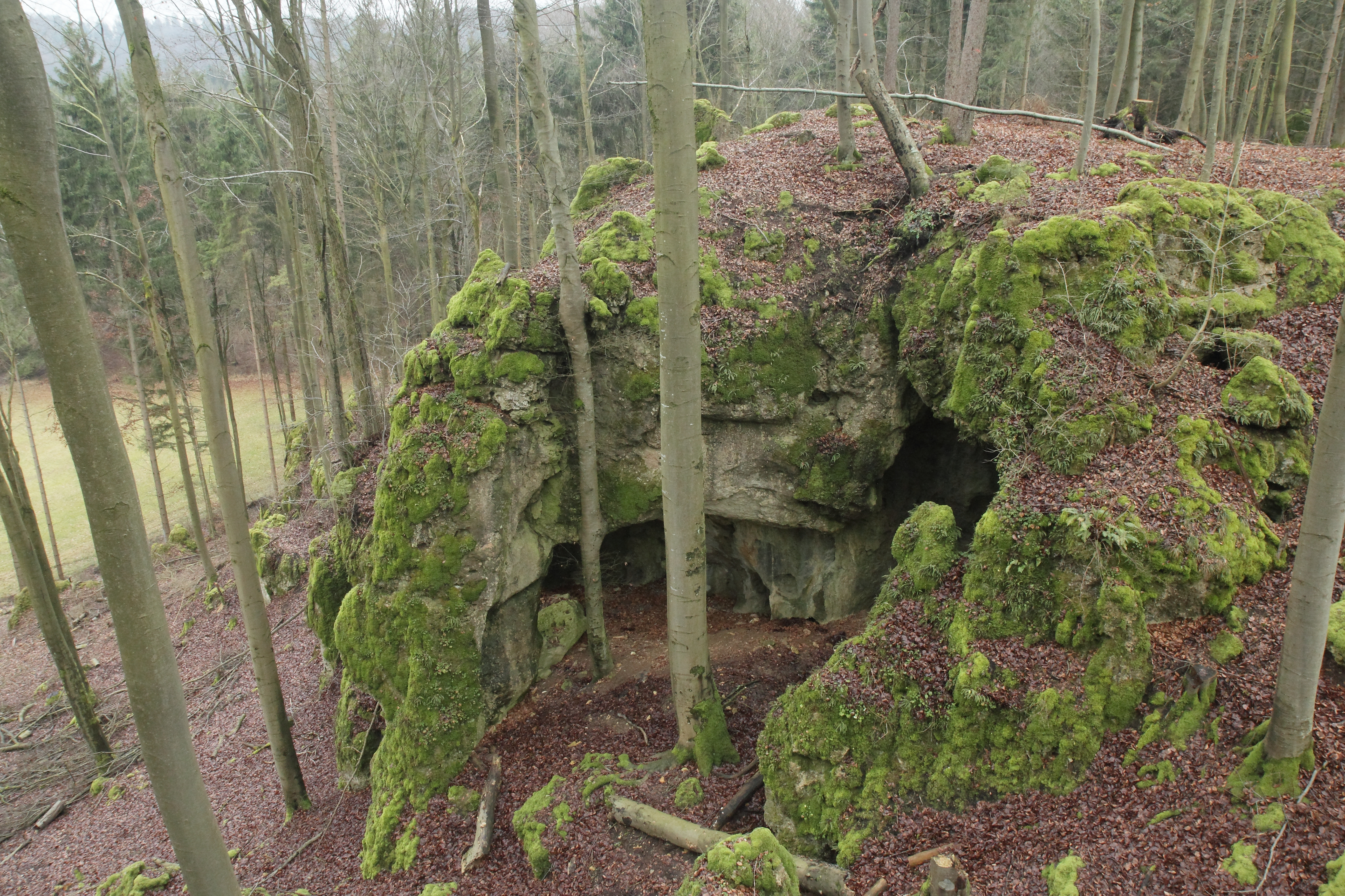 Naturdenkmal und Höhle Steinkirche (D 80)